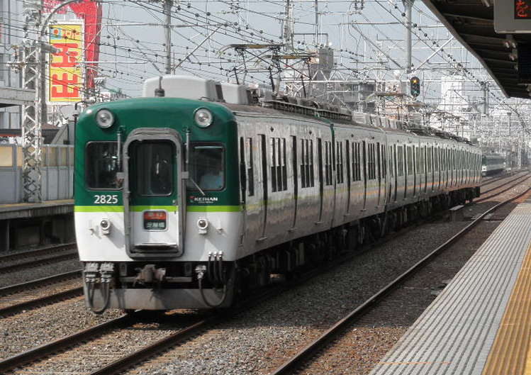 京阪2825F（新旧混色編成）